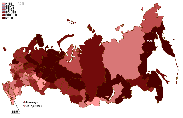 Результаты политической партии ЛДПР на парламентских выборах 2007 года (по регионам)